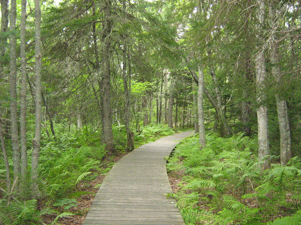 Sentier Mi'kmaq Les Cèdres dans le parc national de Kouchibouguac